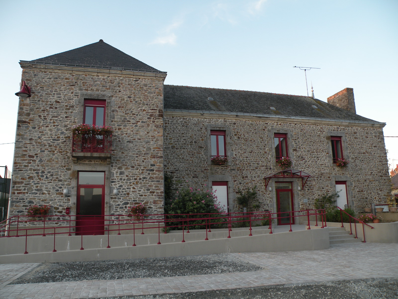 Mairie de La Croixille.